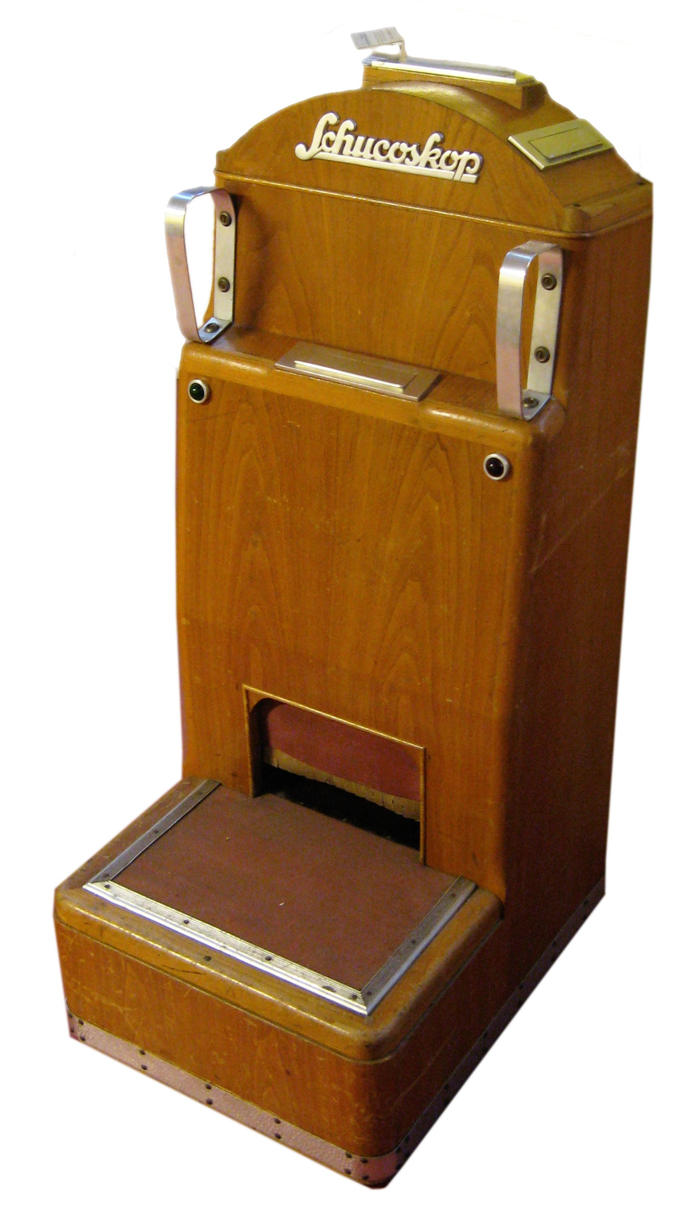 Pedoskop im Deutschen Schuhmuseum Hauenstein